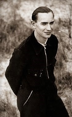 Jean Burgers (1917-1944) résistant belge exécuté à Buchenwald en septembre 1944.